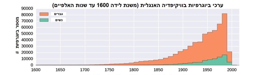 ביוגרפיות בוויקיפדיה האנגלית - נשים וגברים